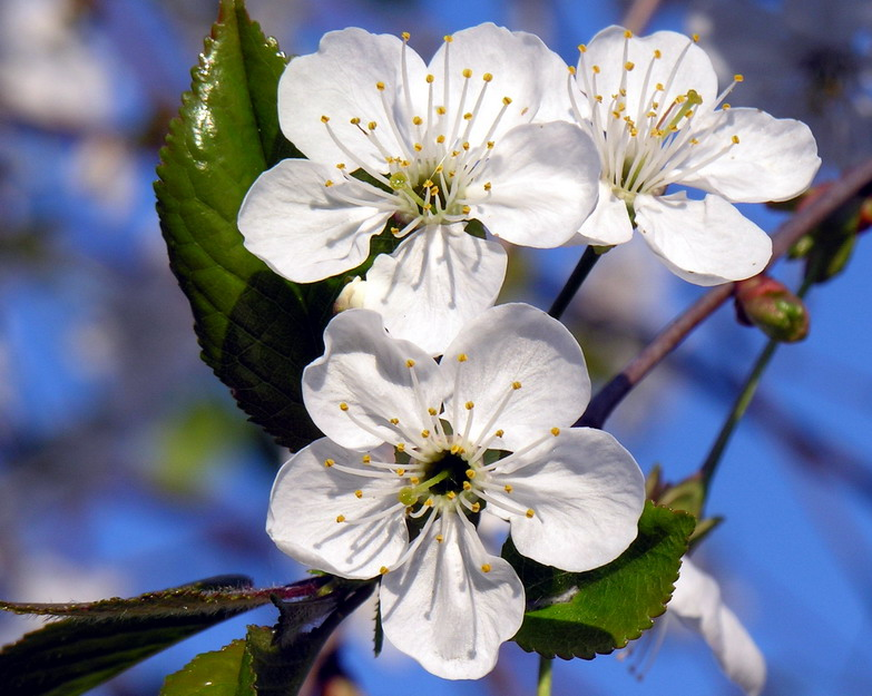 Paprastoji vyšnia (Prunus cerasus syn. Cerasus vulgaris) Šeima. Erškėtiniai (Rosaceae) Foto: Algirdas, 2006 m. gegužės 11 d.